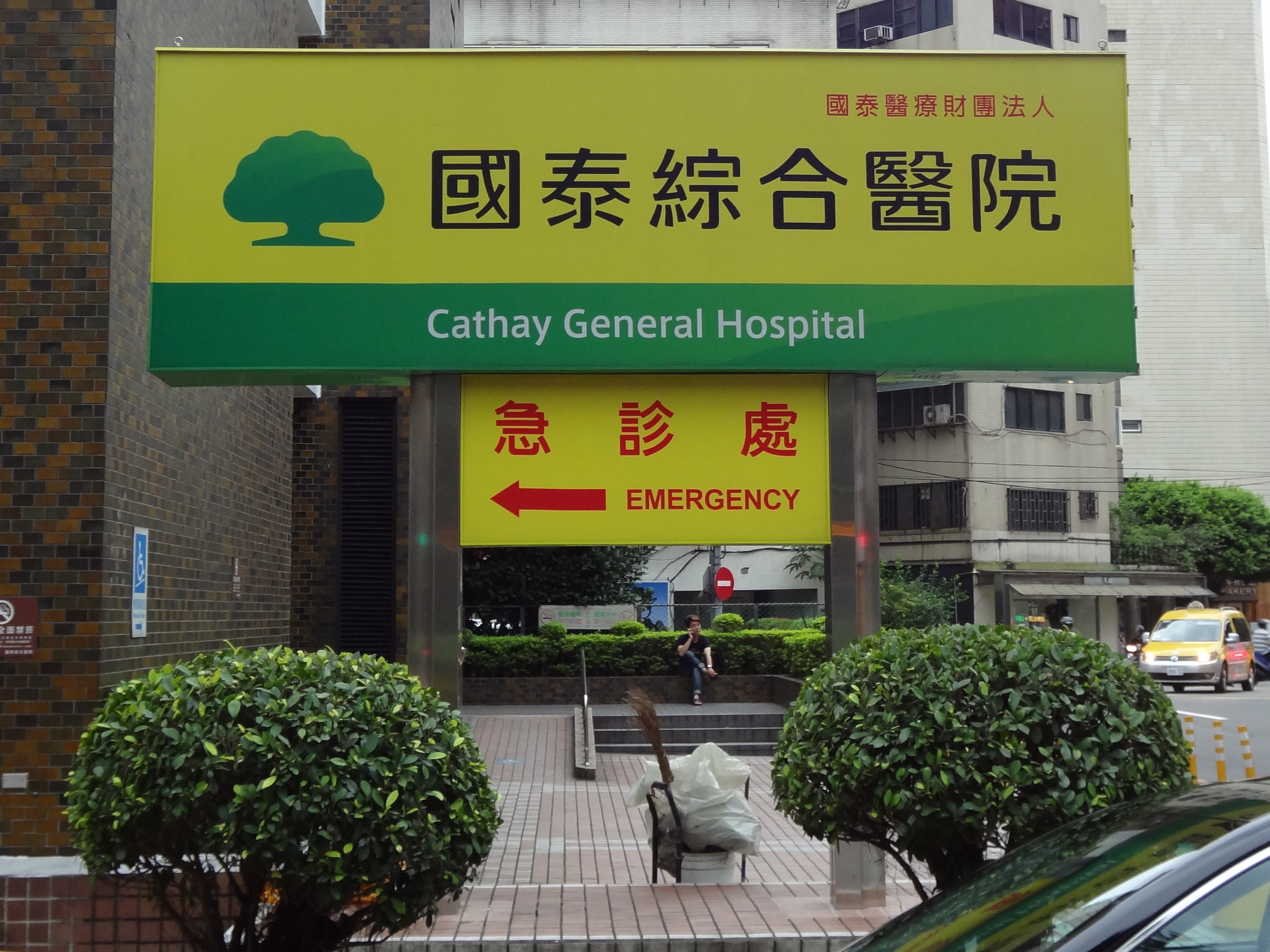 中文（台灣）: 國泰綜合醫院總院急診處指示方向燈箱。